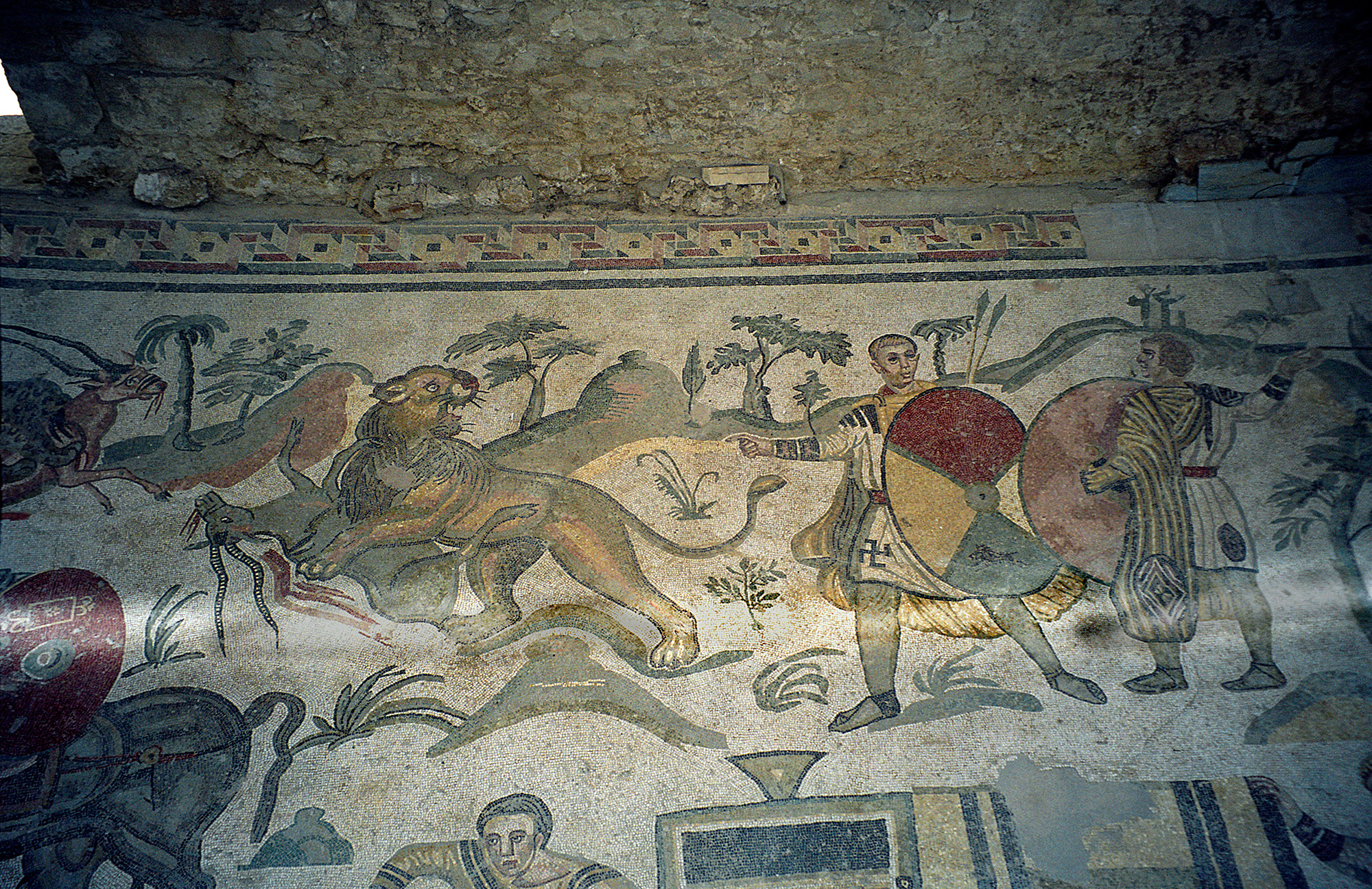 Sicily, Villa Romana del Casale, mozaika "Wielka scena myśliwska" - fragment